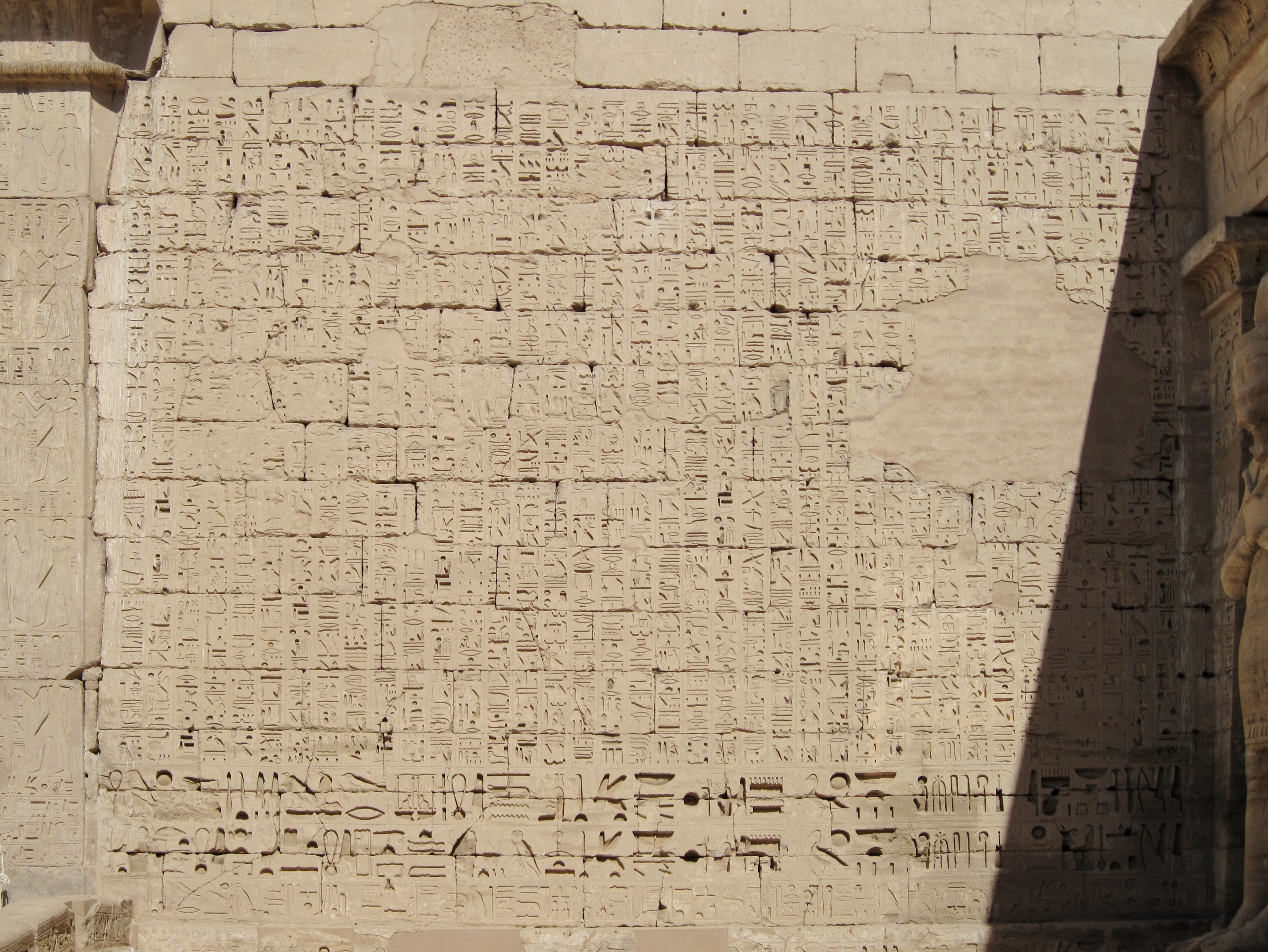 Inschrift der Schilderung des Sieges über die Seevölker im 8. Regierungsjahr des Königs (Pharao) Ramses III. Relief am zweiten Pylon im ersten Hof des Totentempels Ramses’ III. in Medinet Habu, Ägypten (The inscription of the year 8; Englische Übersetzung)